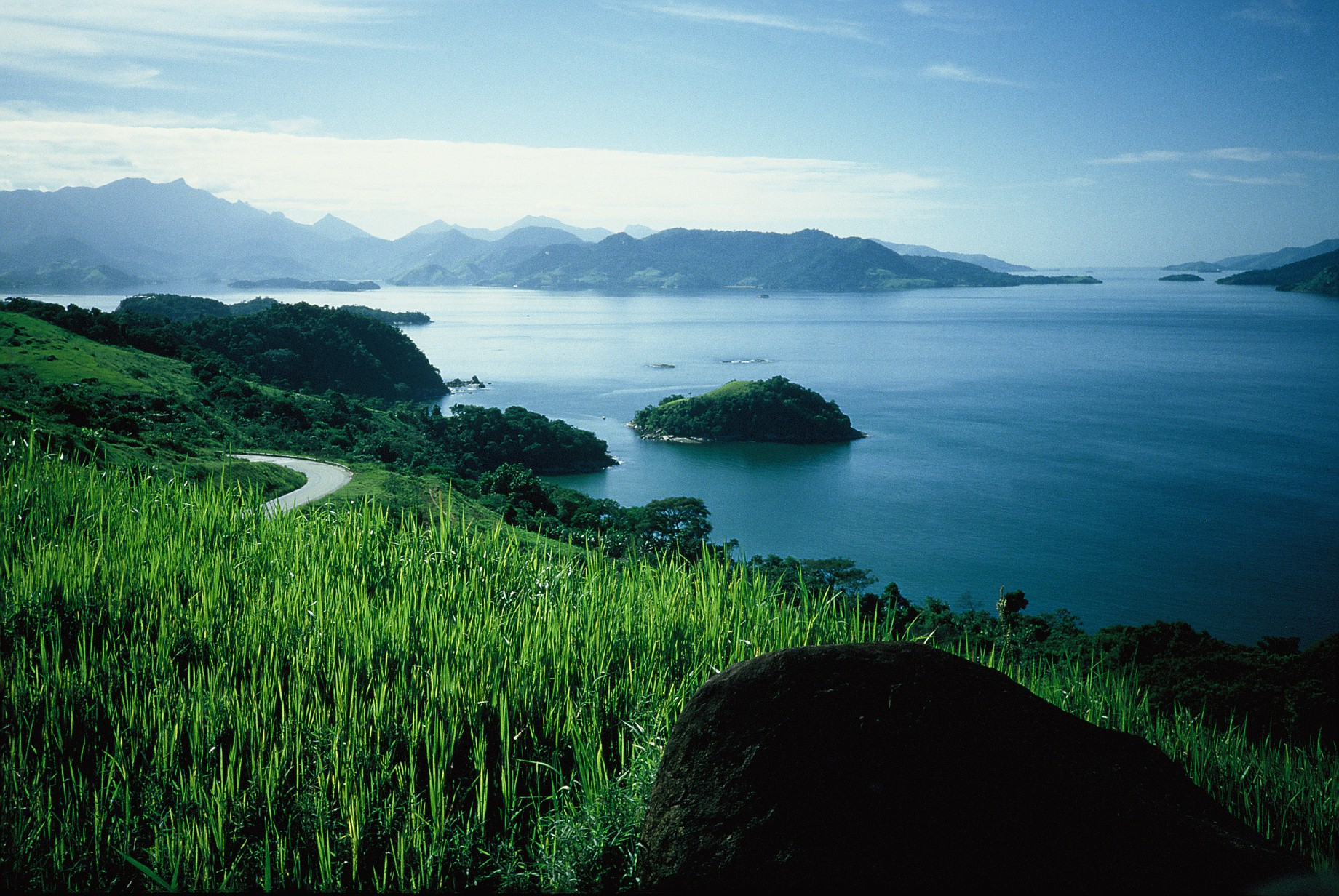 Ilha Grande, Rio de Janeiro, Brasilien